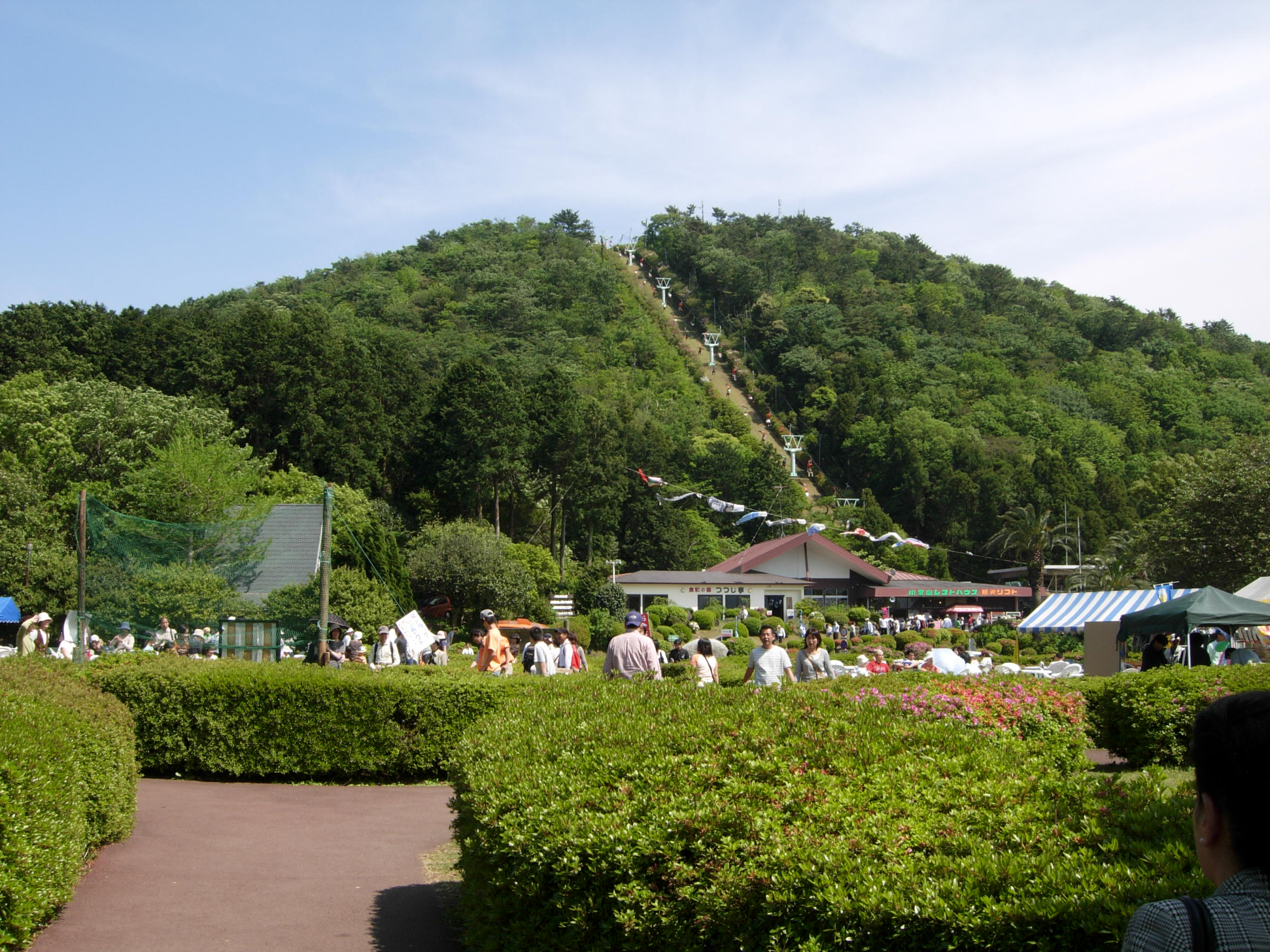 小室山リフト